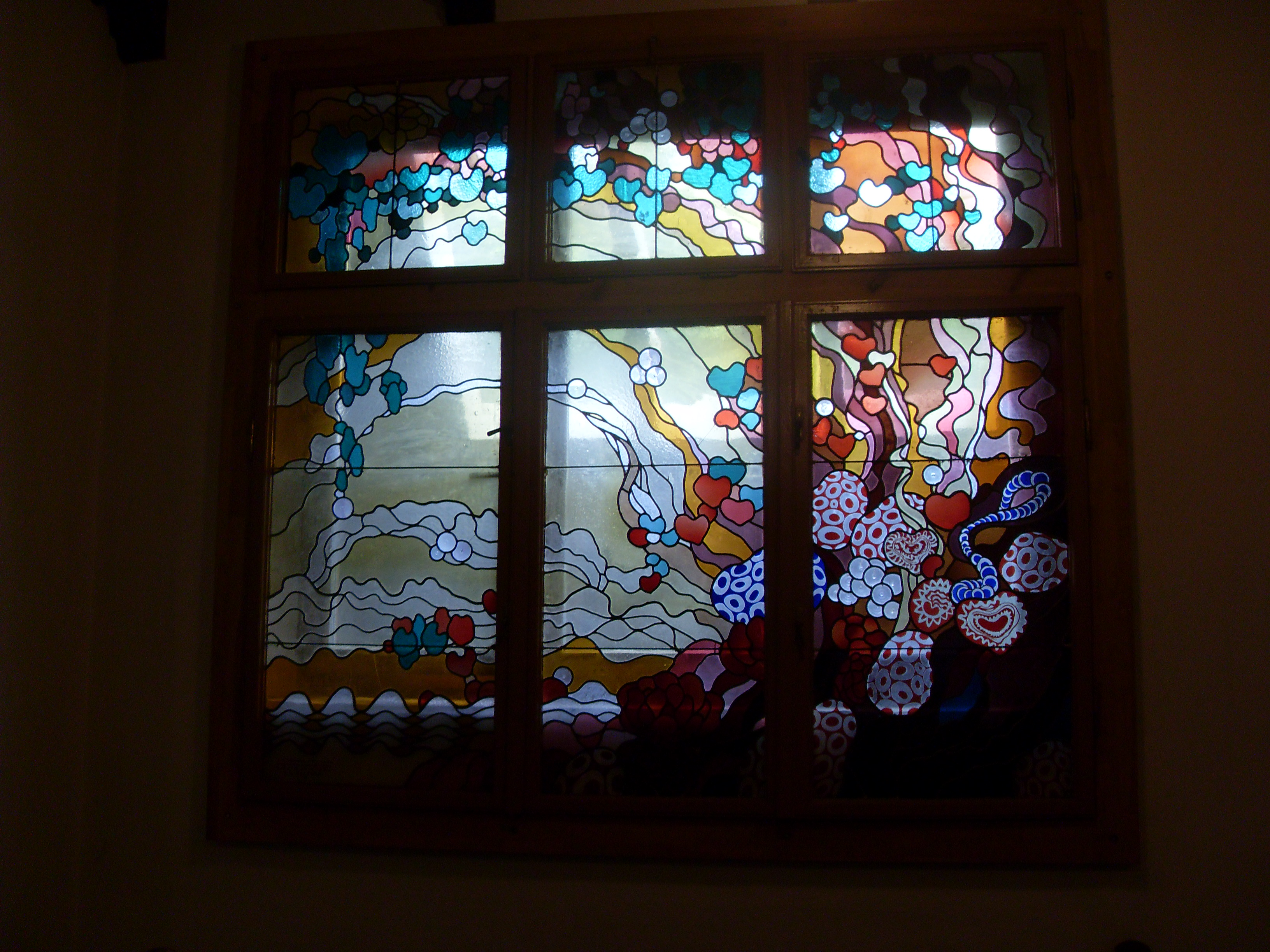 Henryk Uziembło - witraż w willi dyrektorów kopalni Siersza z 1909 r.